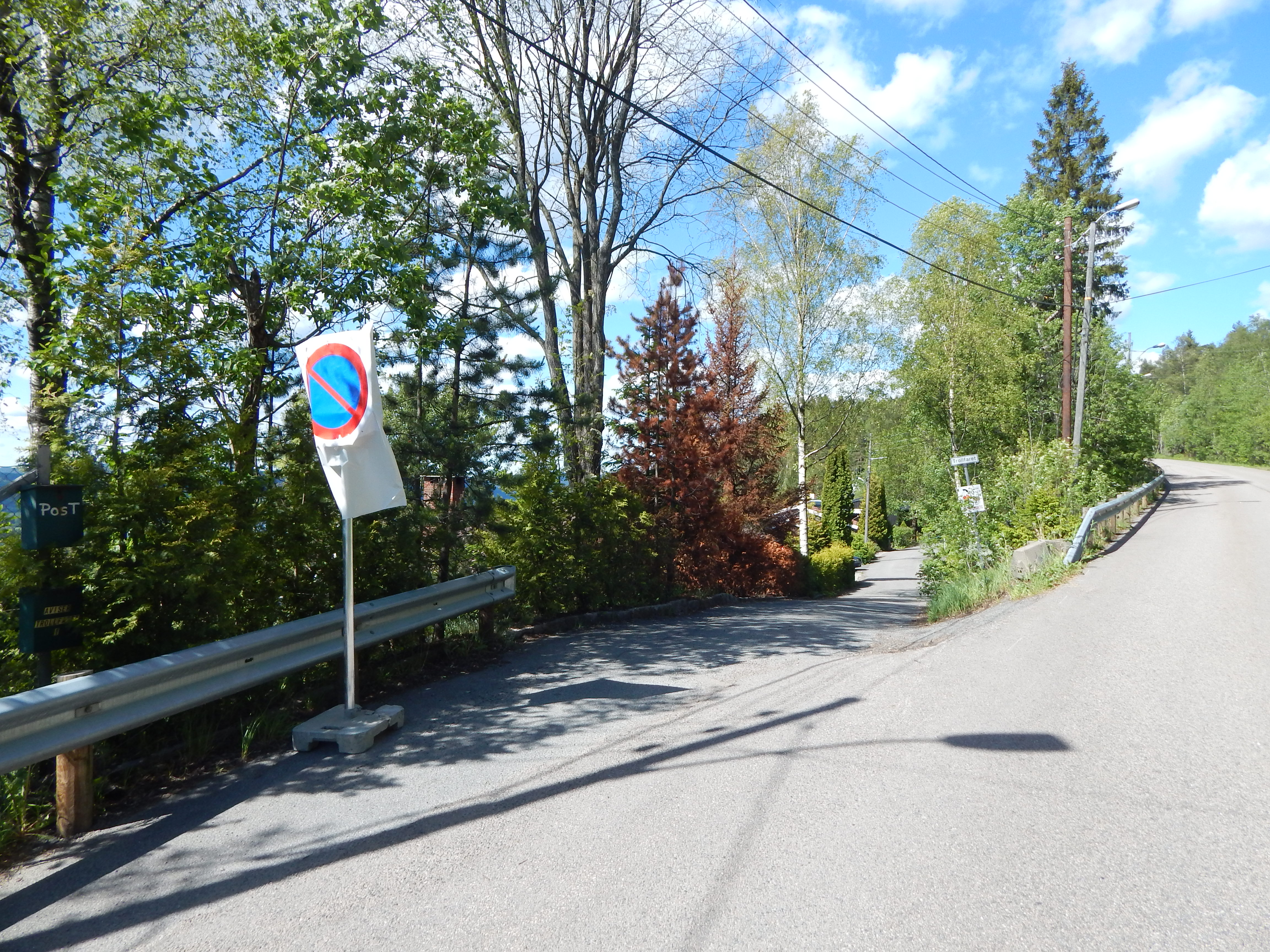 Trollfaret